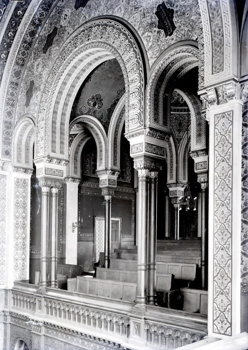 Wnętrze Wielkiej Synagogi w Łodzi.